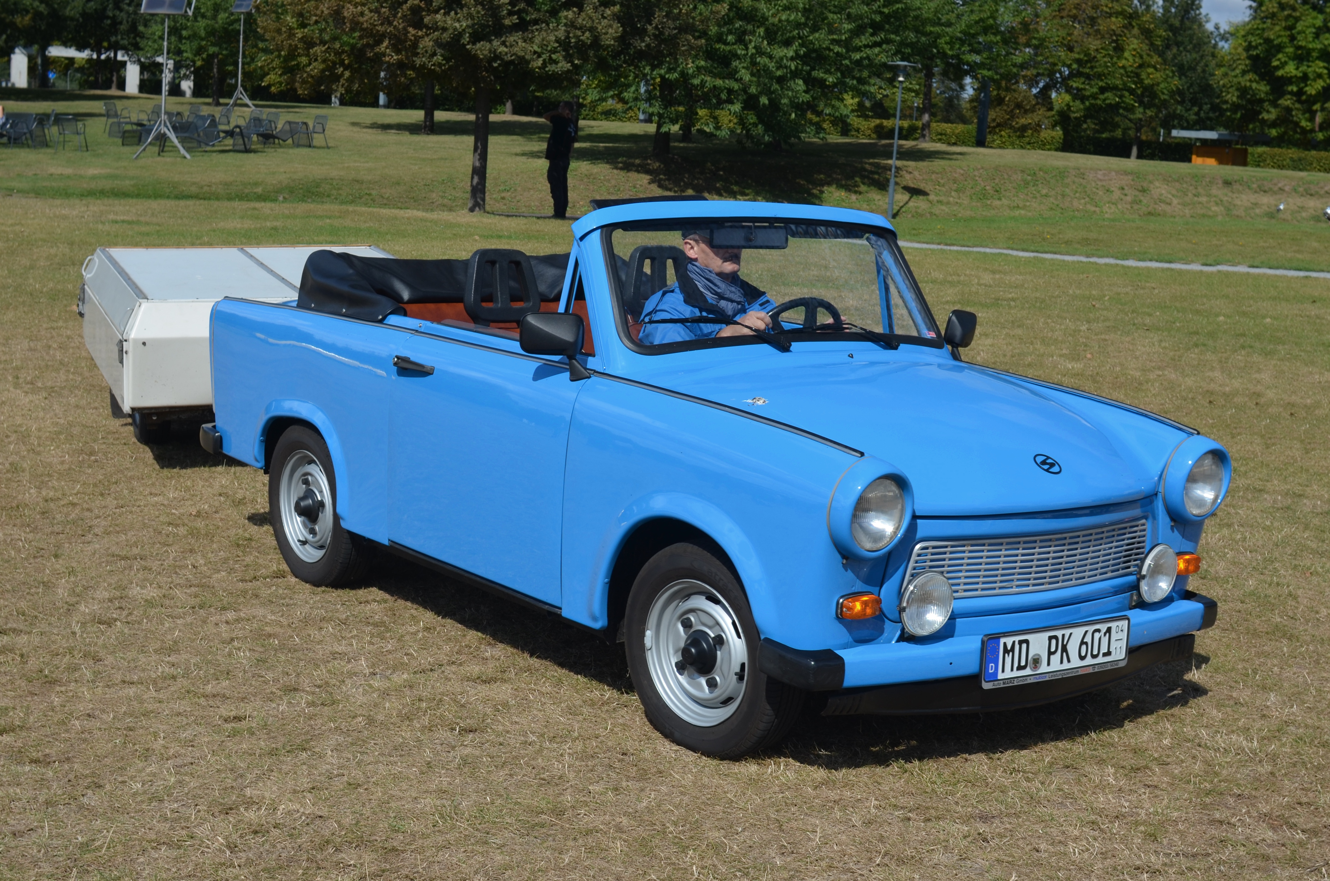 Trabant